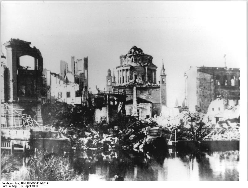 ADN-ZB-Archiv-12.4.80-eng-Potsdam: Vor 35 Jahren, in der Nacht vom 14. zum 15. April 1945, wurde wenige Tage vor der Befreiung durch die Sowjetarmee das Stadtzentrum Potsdams durch englische Fliegerverbände in Schutt und Asche gebombt. Mehr als 1.100 Gebäude, darunter kulturhistorisch wertvolle Bauwerke wie die nach dem Entwurf von Karl-Friedrich Schinkel erbaute Nikolaikirche (Mitte), wurden zerstört oder stark beschädigt. 3.500 Menschen fanden bei den Angriffen den Tod. - siehe auch W0412-15, 16, 17n